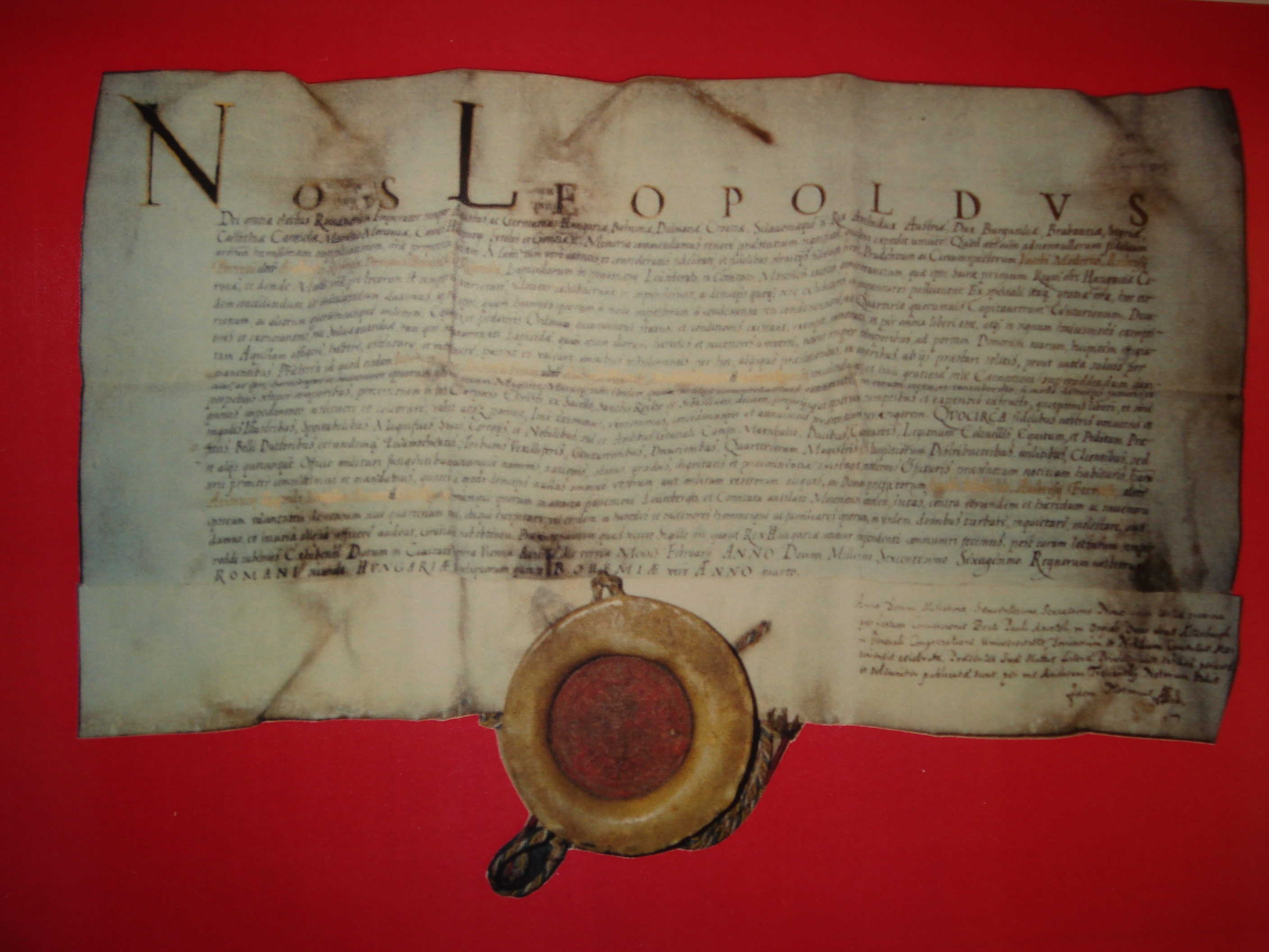 Kaiser Leopold I. bestätigt am 3. Feber 1660 seinem kaiserlichen Steinbruch am Leithaberg, seinen namentlich genannten Steinmetzen, das Recht: Frei zu sein .. von militärischer Einquartierung